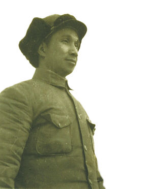 1949年，指挥淮海战役的粟裕